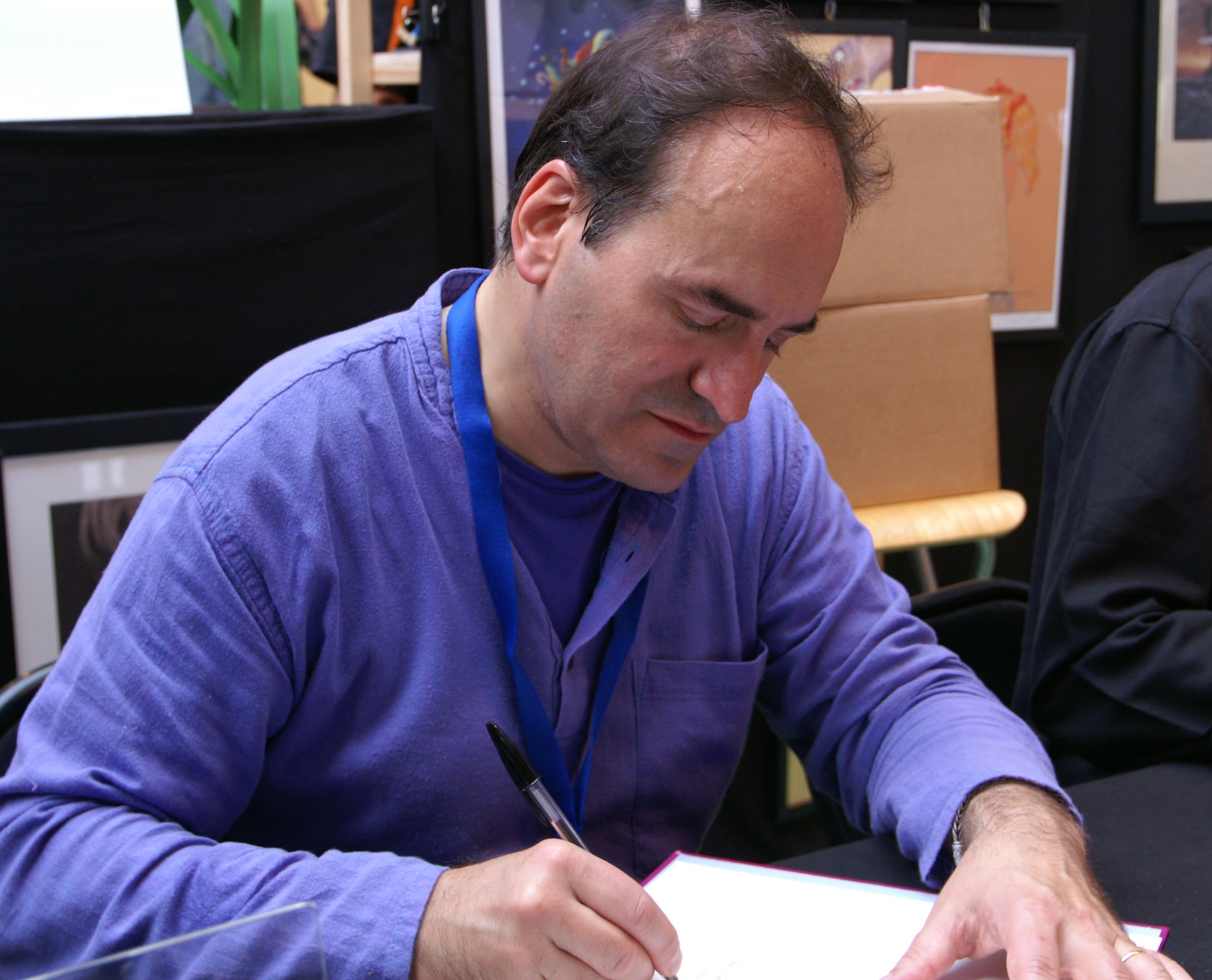 Maëster, au festival Quai des Bulles à Saint-Malo en 2010.